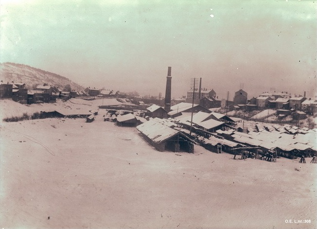 Jordal Teglverk, Hedemarksgata, Kampen, Vålerenga.